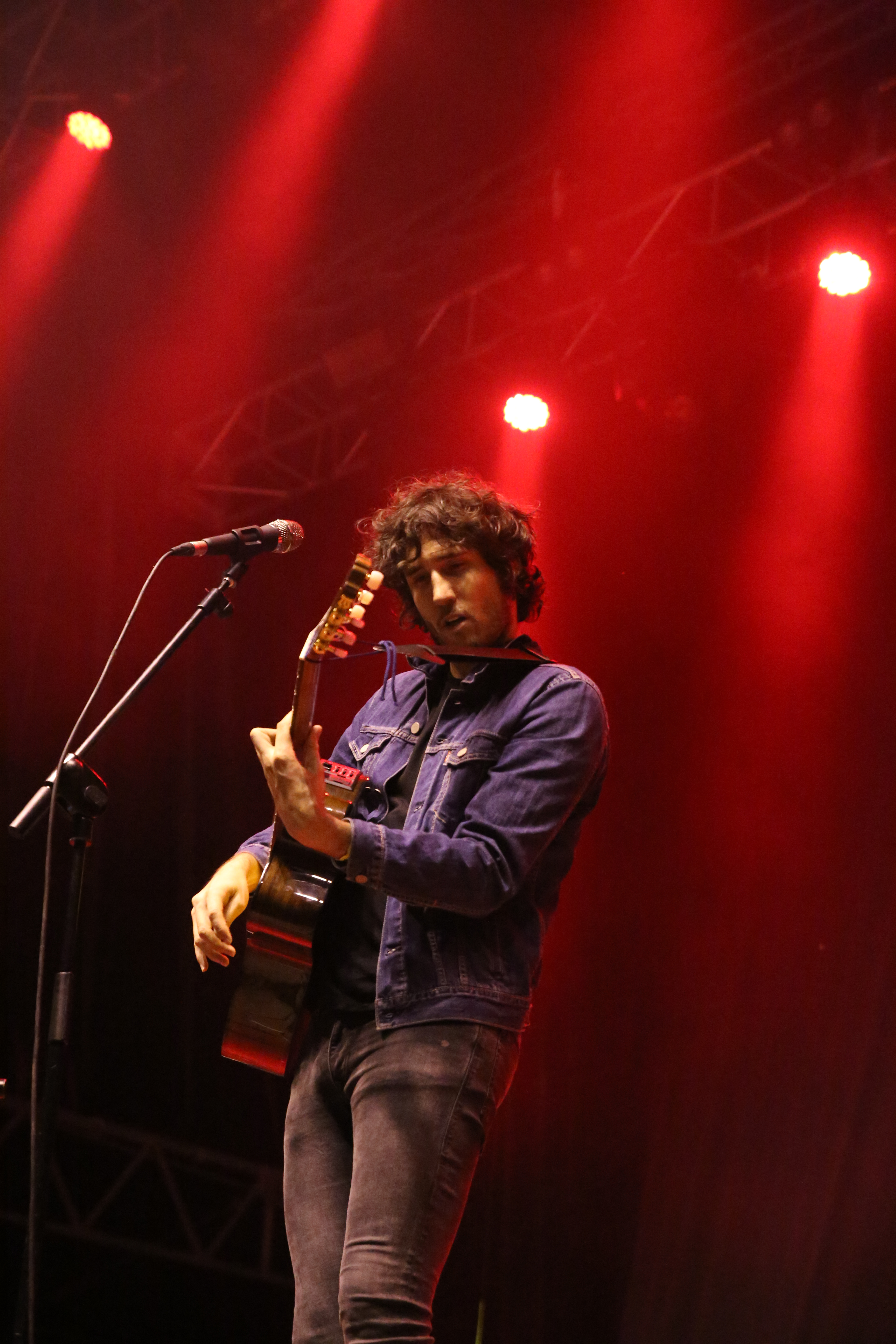 El grupo Amatria en el festival Palencia Sonora 2017.